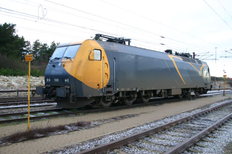 DSB EG3103 im Betriebswerk Padborg.